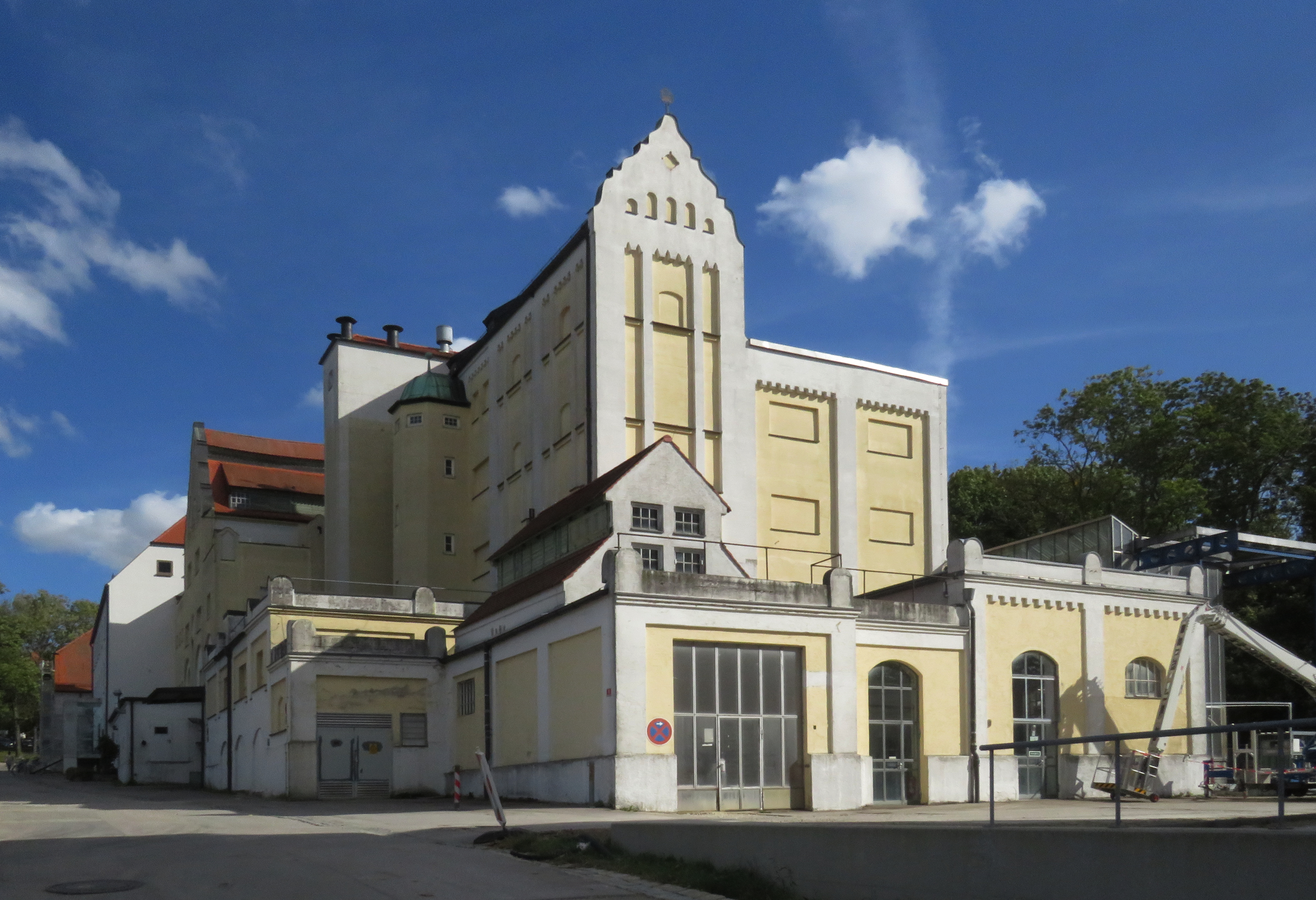 Forschungsbrauerei Weihenstephan; Weihenstephaner Steig 18-20